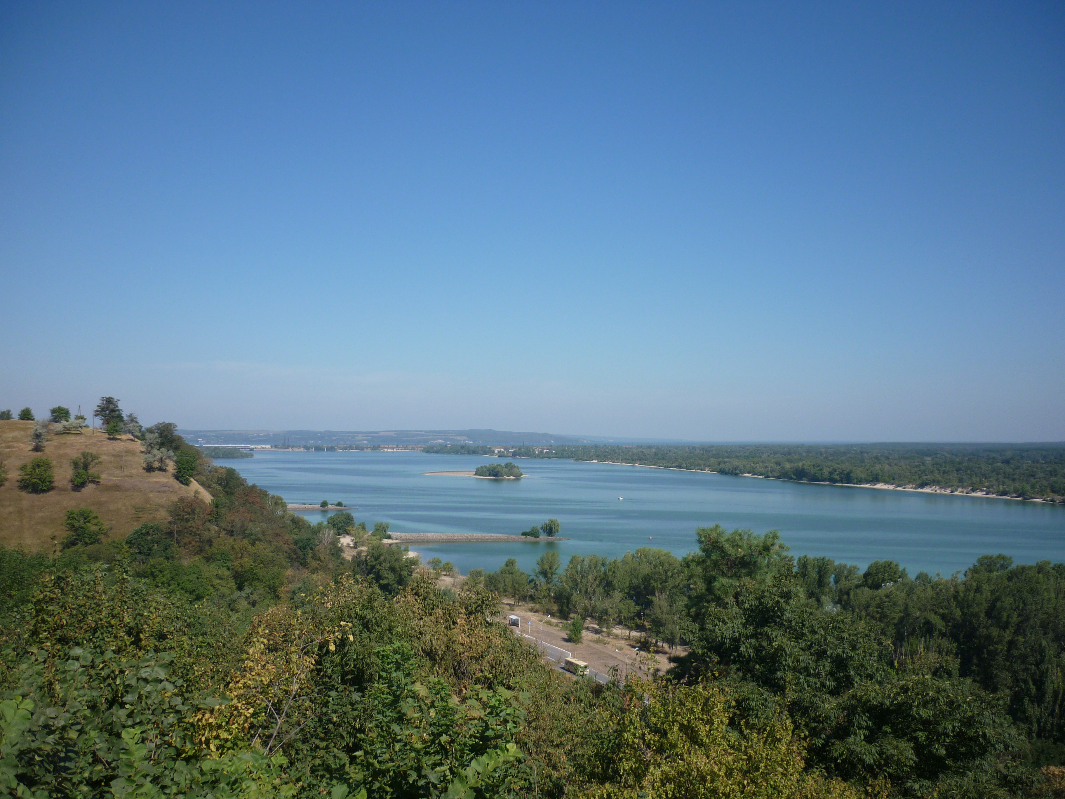 Вигляд на Дніпро з Тарасової гори